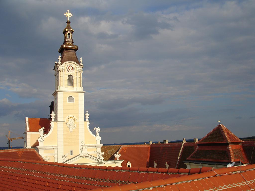 Stift Altenburg, Turm der Stiftskirche